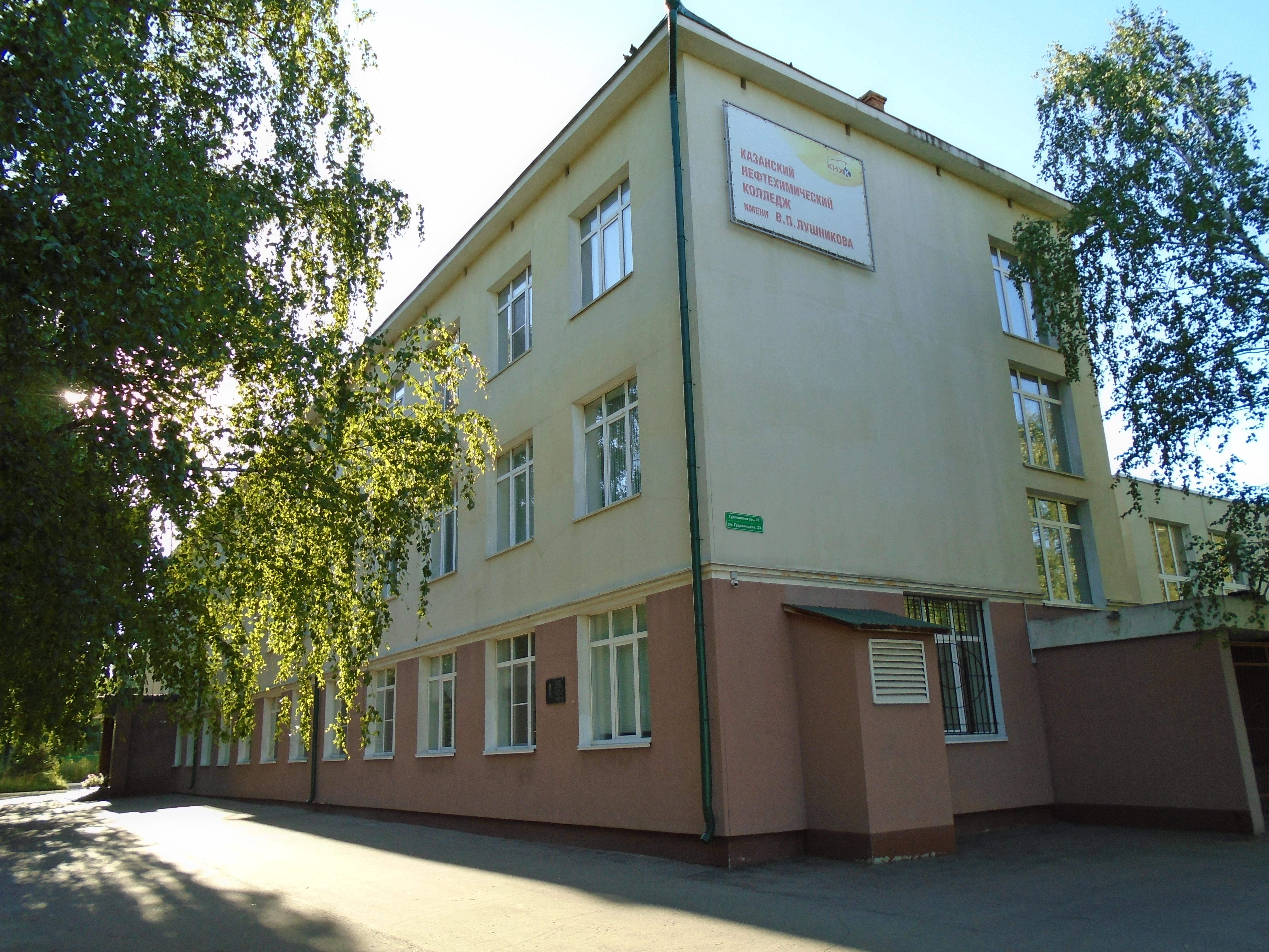 Здание Казанского нефтехимического колледжа им. В. П. Лушникова